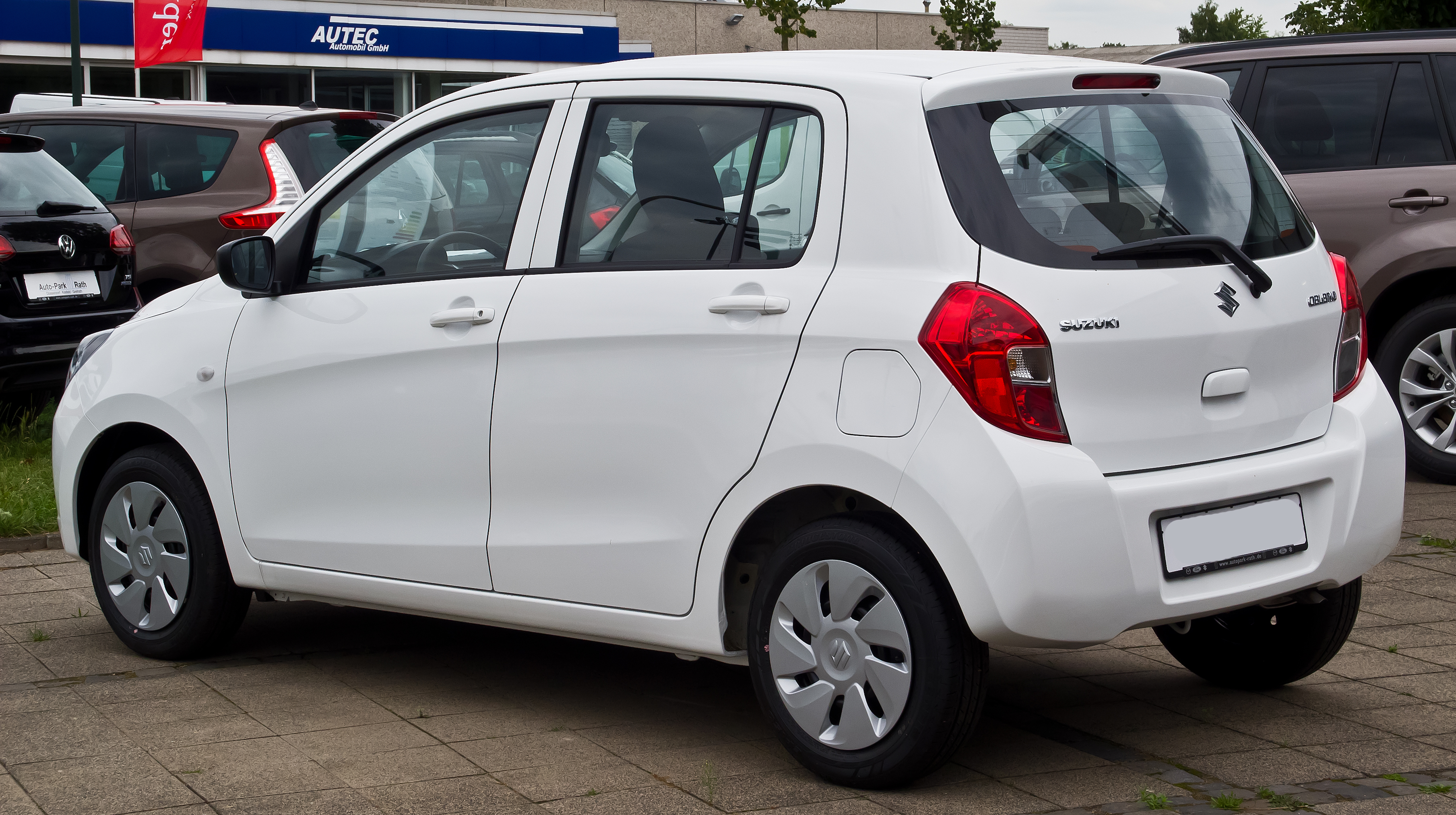 Suzuki Celerio 1.0 Club